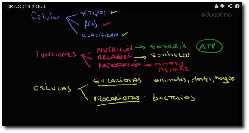 Video de Educatina